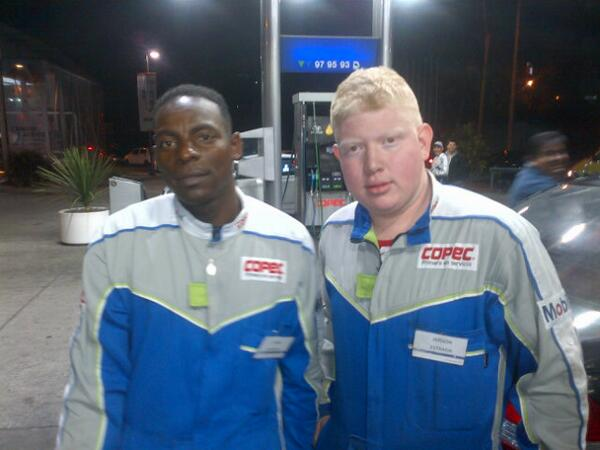 Inmigrante colombiano junto a su compañero de trabajo desempeñándose como bencinero en una estación de servicio en Antofagasta, Chile. En el último tiempo son cada vez menos los chilenos que optan por este tipo de empleos debido a las mejoras en las oportunidades laborales, dejando este tipo de trabajos a inmigrantes, principalmente colombianos y haitianos.